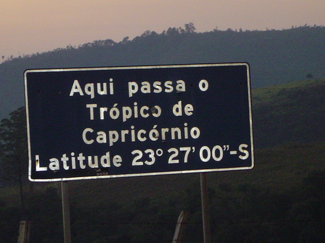 Trópico de Capricórnio. Linha imaginária que passa pelo Estado de São Paulo. Esta foto mostra o ponto de passagem no município de Santana de Parnaíba. WARNING: This was true for 1917; the Tropic is presently (Epoch 2011) at 23º 26' 16" - See Useful constants